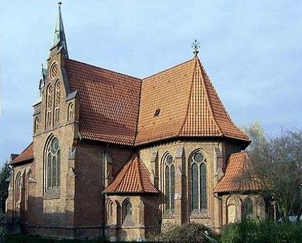 Lauenau, ev.-luth. St.-Lukas-Kirche